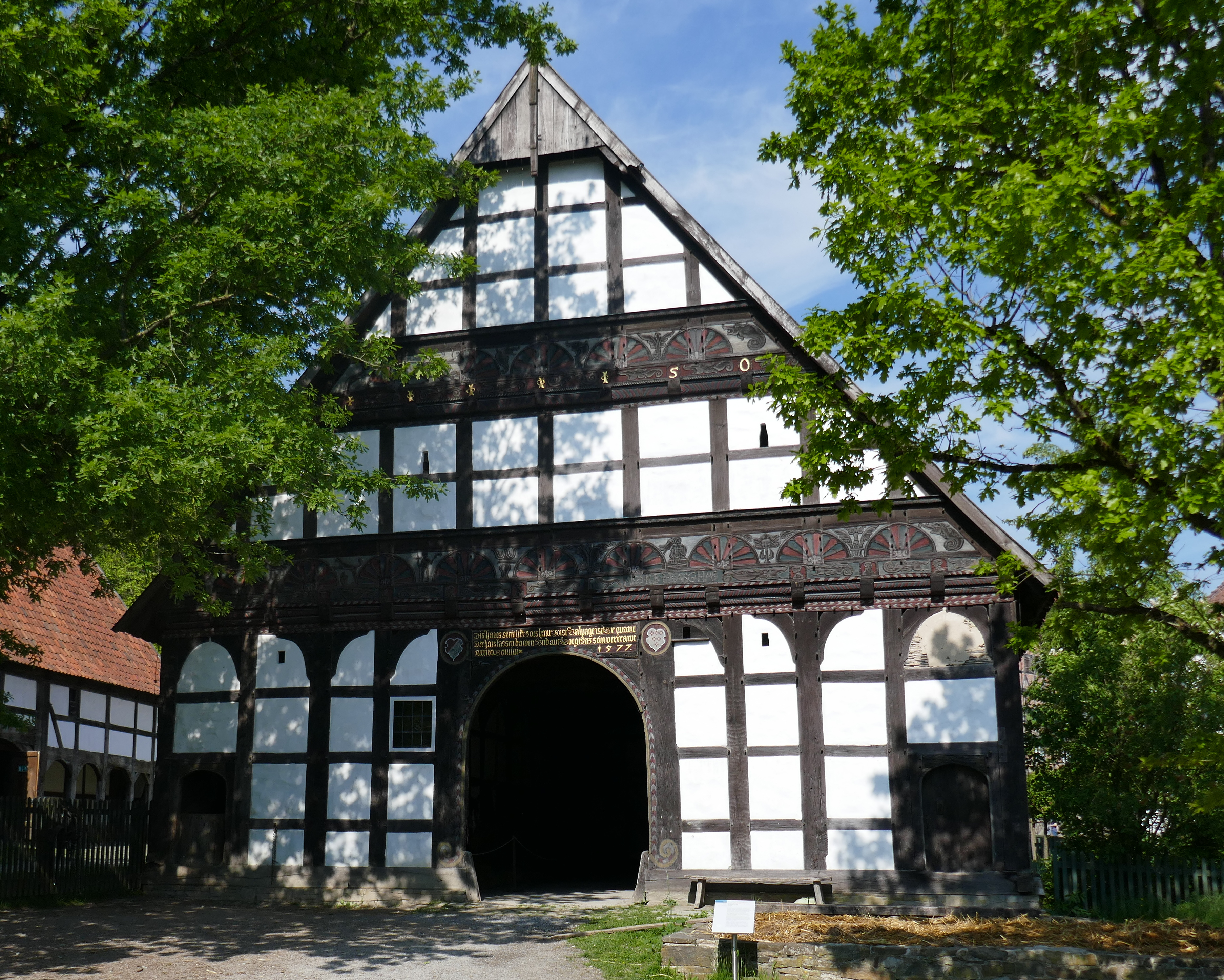 Hof Valepage im Freilichtmuseum Detmold. Ursprüglich stand der Hof in Delbrück.